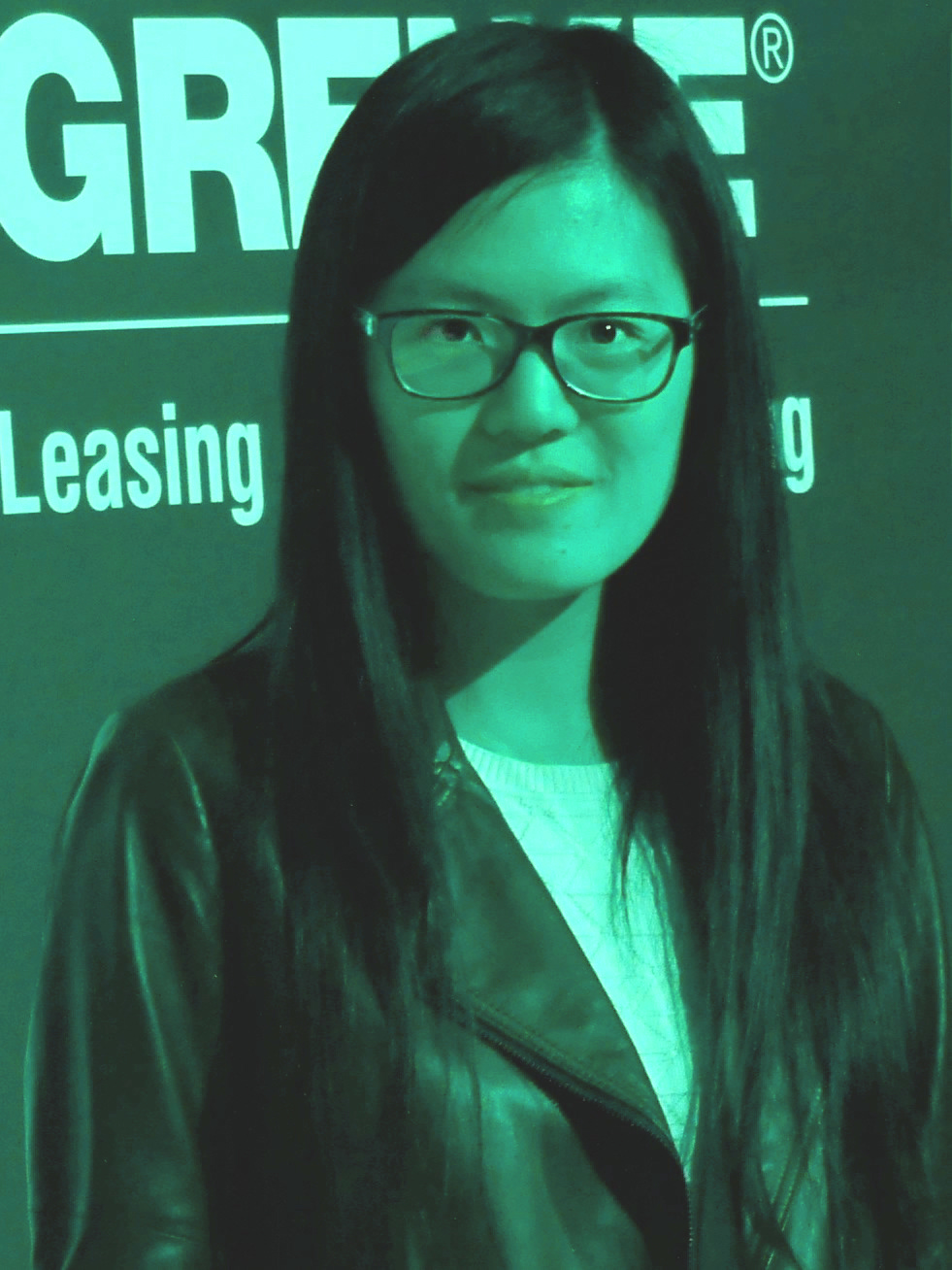 Hou Yifan 2017 in Baden-Baden, Grenke Chess Classic.